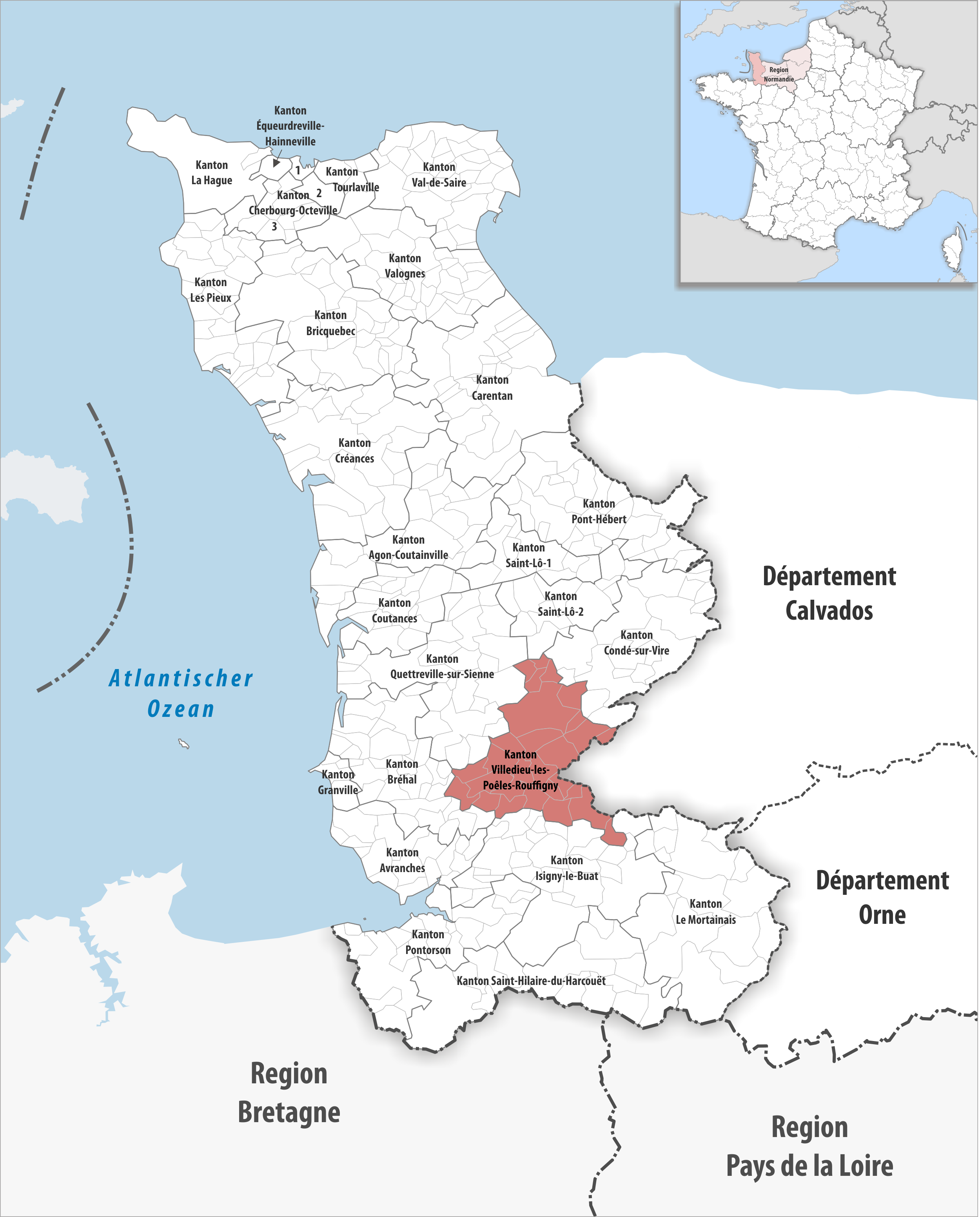 Lage des Kantons Villedieu-les-Poêles